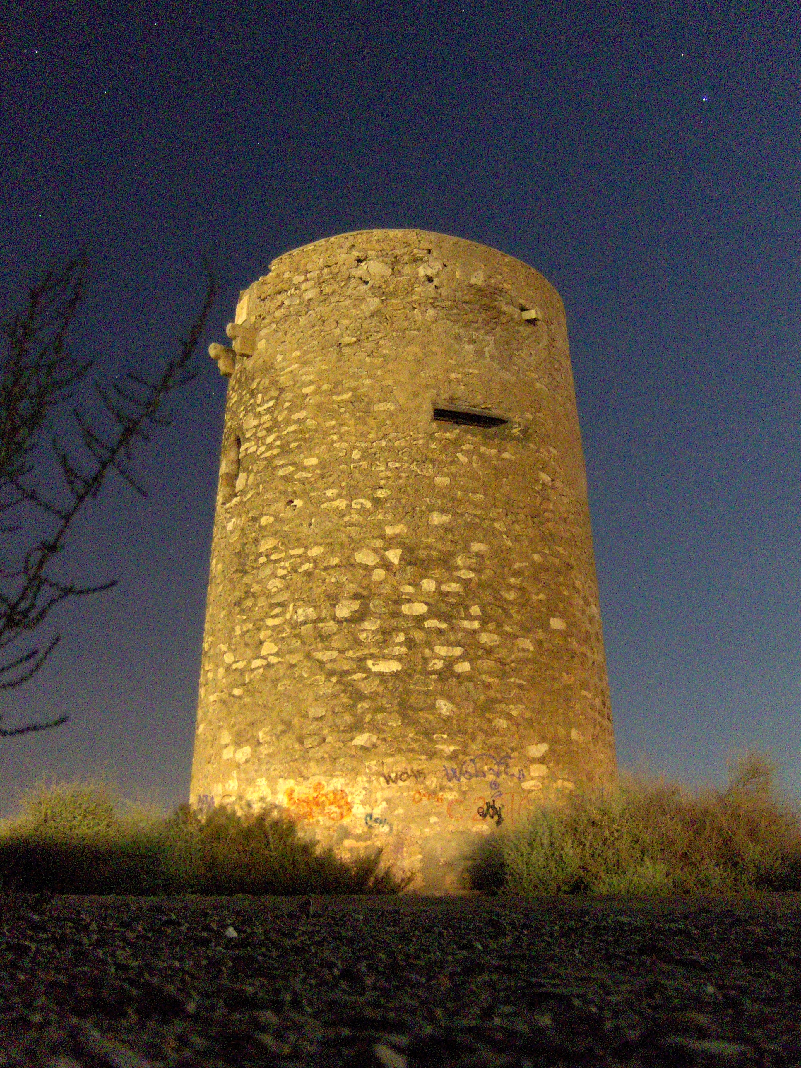 Torre de El Perdigal, en Almería, junto al aeropuerto. Fotografía tomada a las 11 de la noche, con una larguísima exposición.